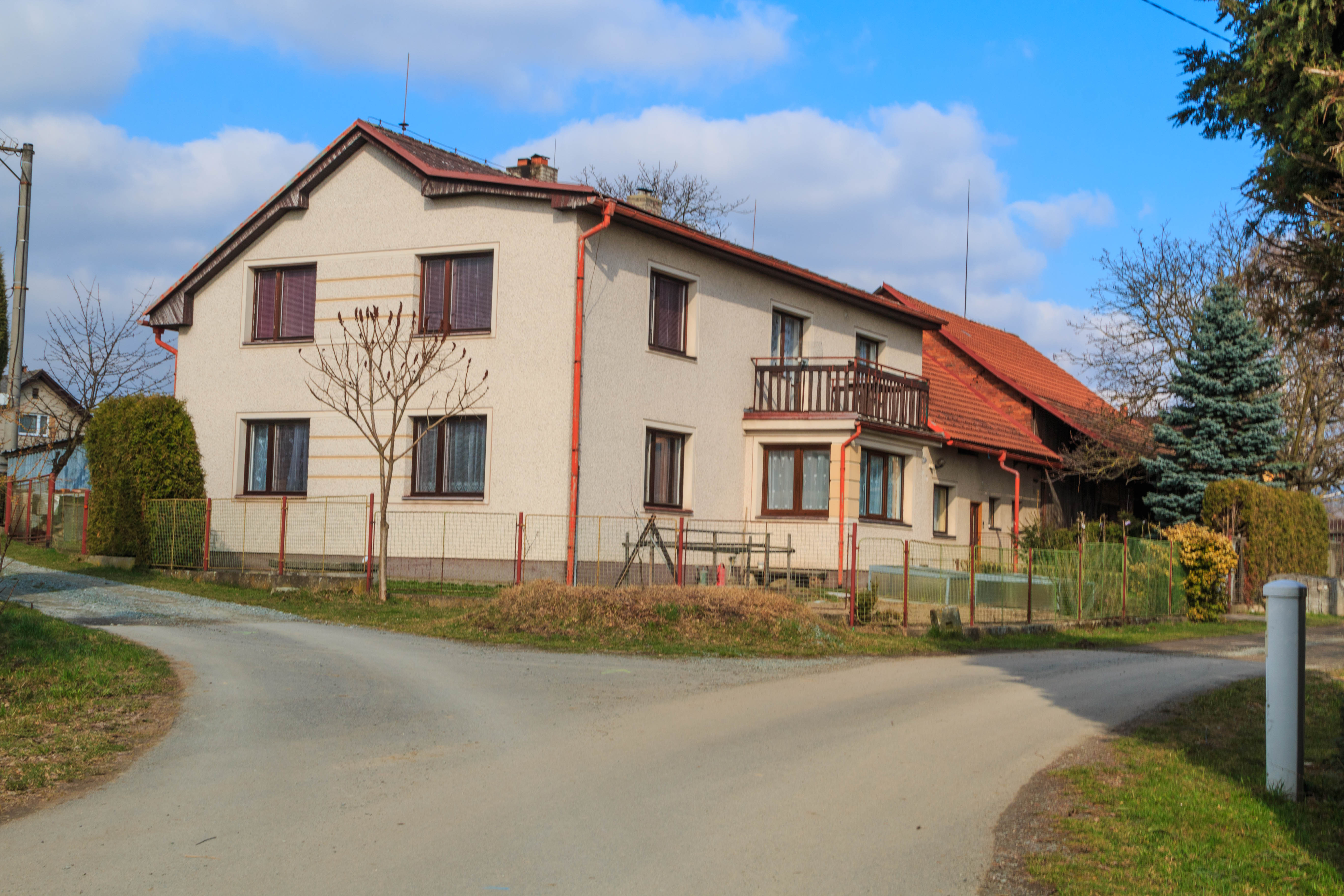 Víska u Brocné - čp. 53